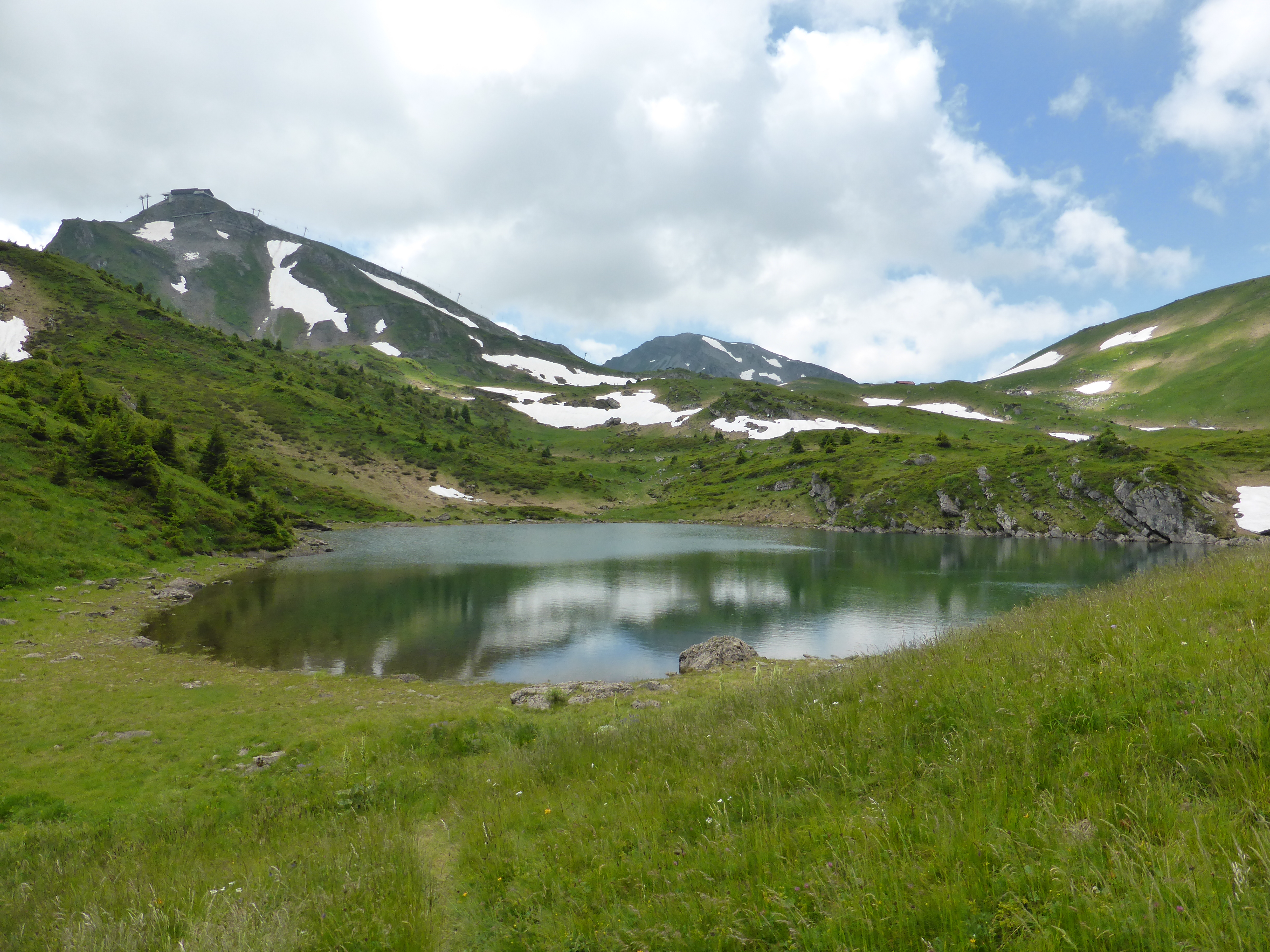 Lac de Chésery, Monthey, Kanton Wallis, Schweiz. Im Hintergrund links die Pointe des Mossettes.